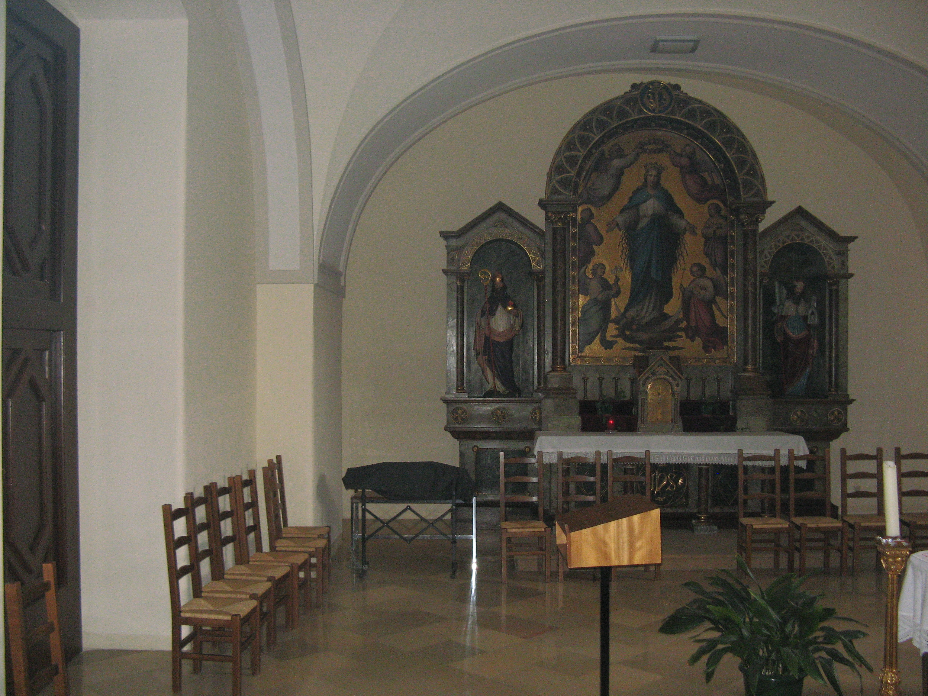 Mariazellerkapelle in der Meidlinger Pfarrkirche in Wien-Meidling